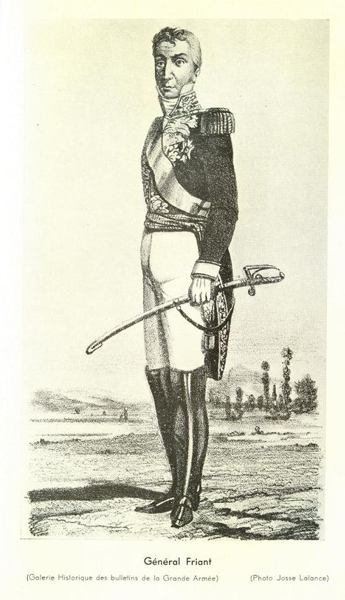 General Friant (1758-1829)